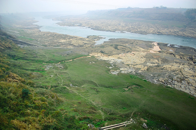 红水河风光